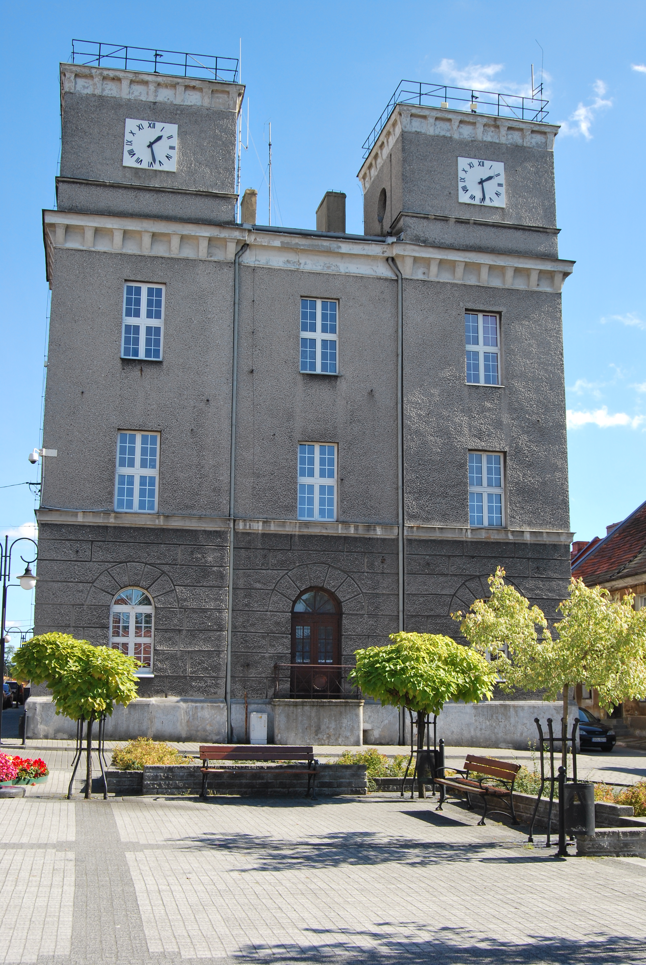 Toszek - ratusz z 1. poł. XIX w. (zabytek nr A/377/60 z 10.03.1960)